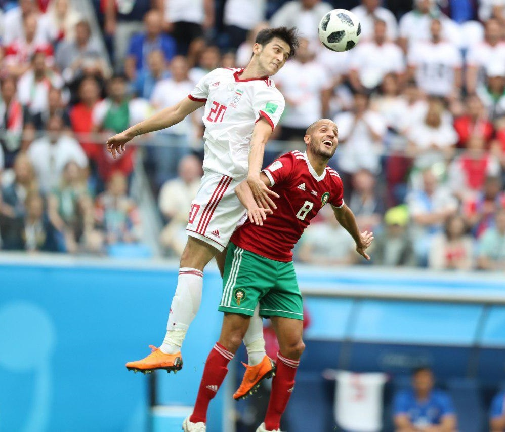 بازی تیم فوتبال ایران و مراکش در جام جهانی ۲۰۱۸